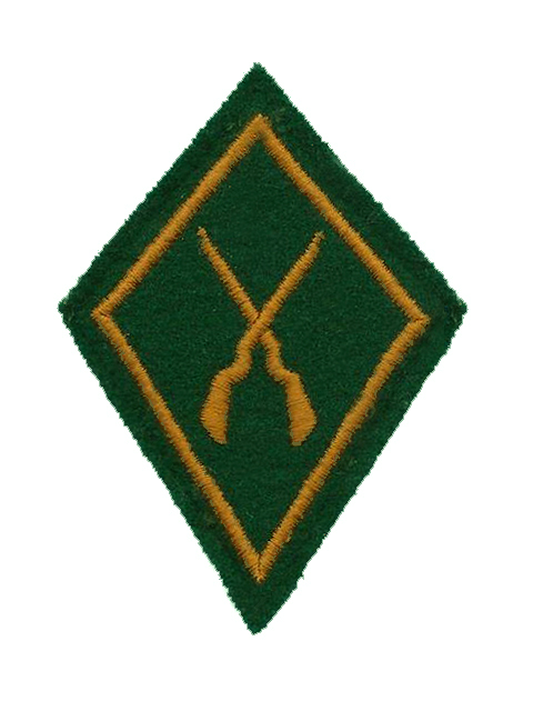 Kragenspiegel Füsilier